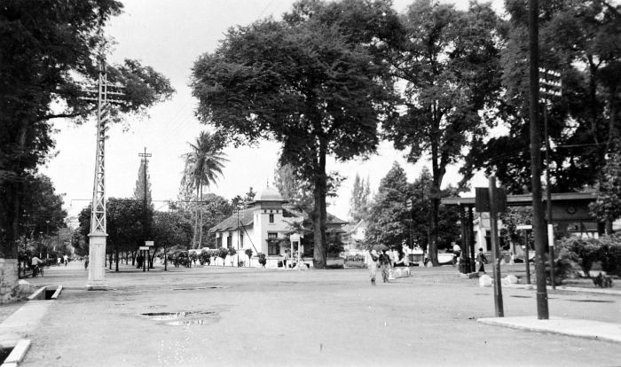 Repronegatief. Dr. Yap-boulevard en Mataram boulevard (Kota baru), Jogjakarta, Midden Java